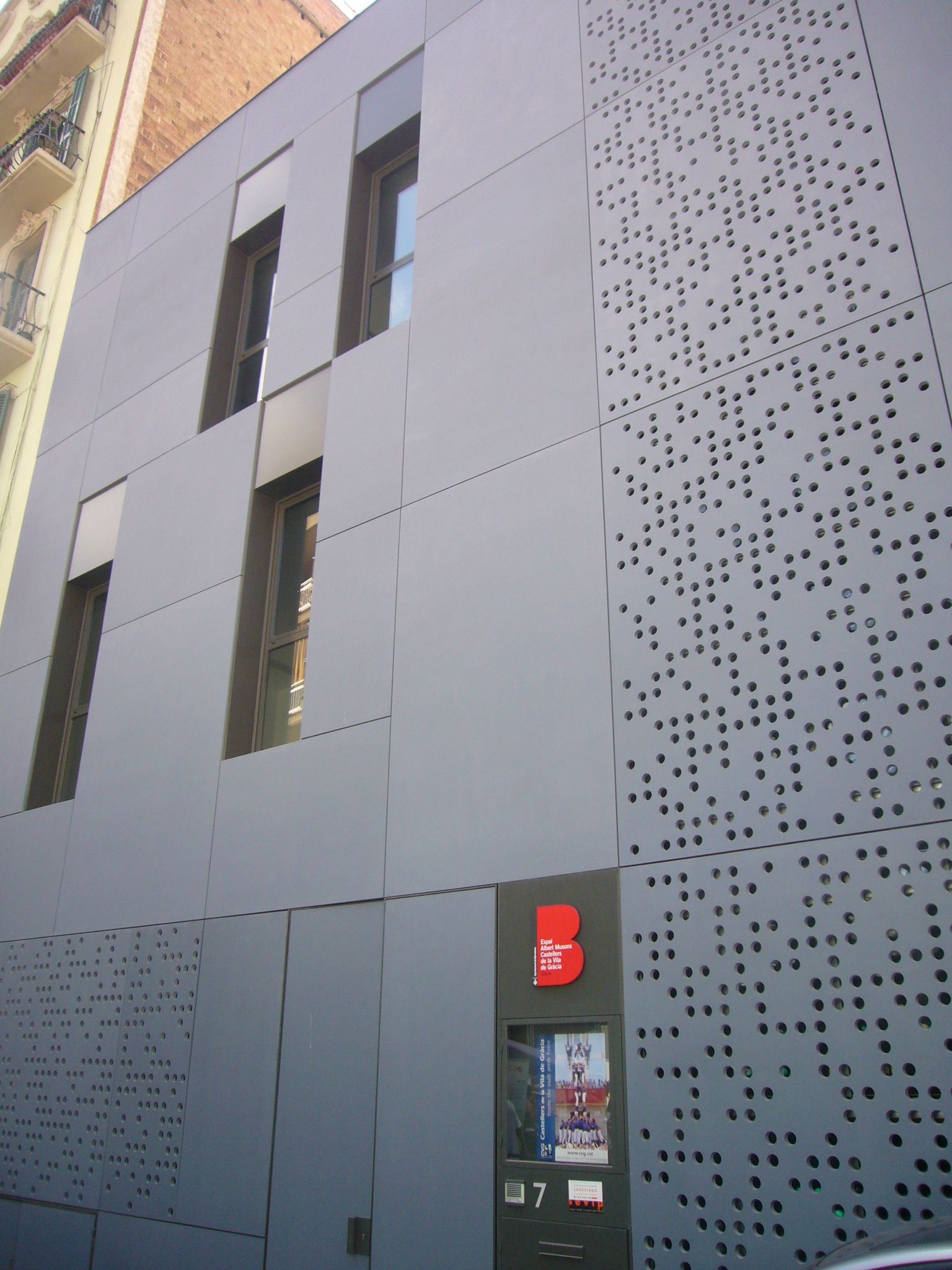 Espai Albert Musons (castellers de gràcia)